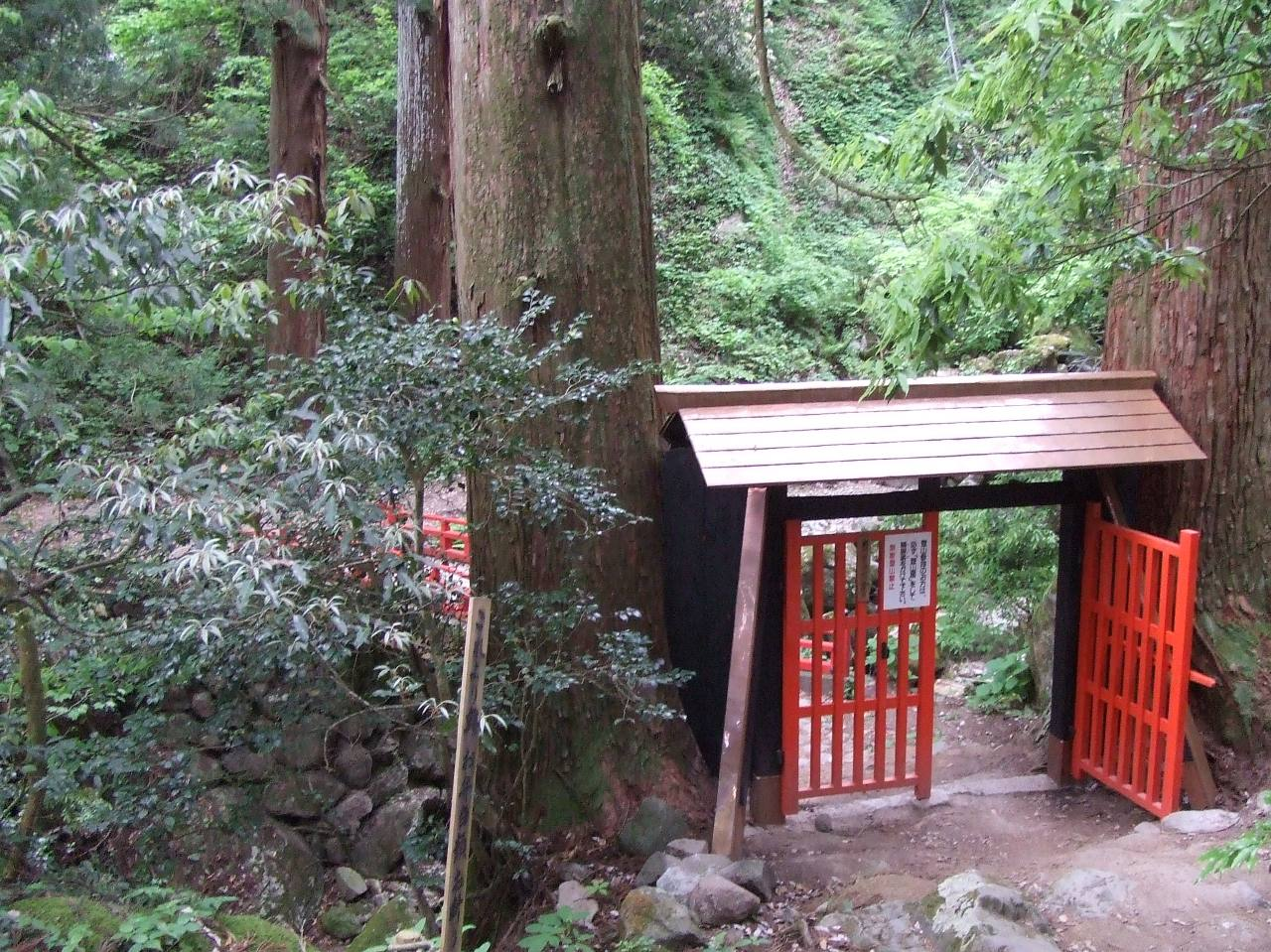 三徳山の奥之院への入口